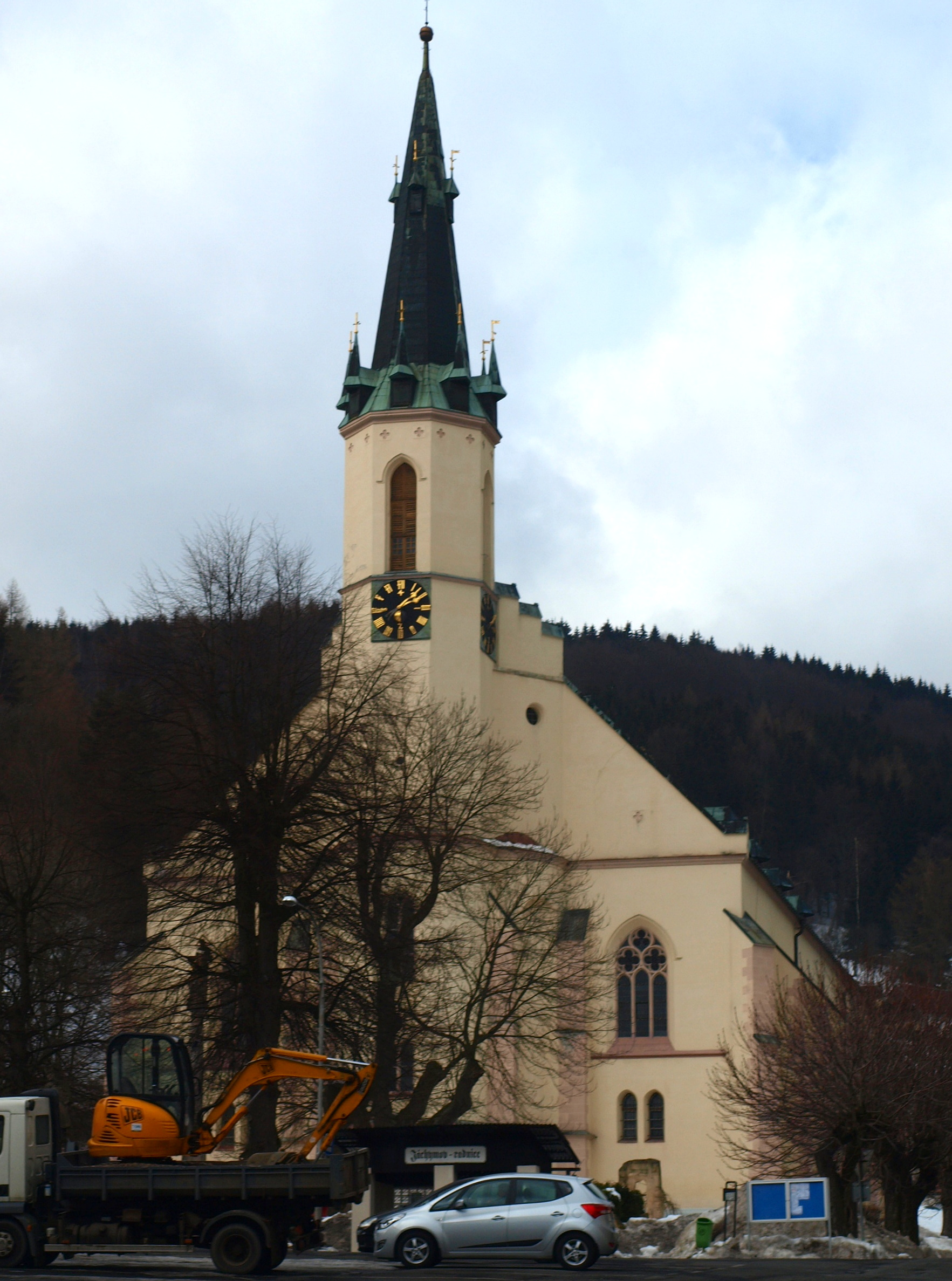 Jáchymov